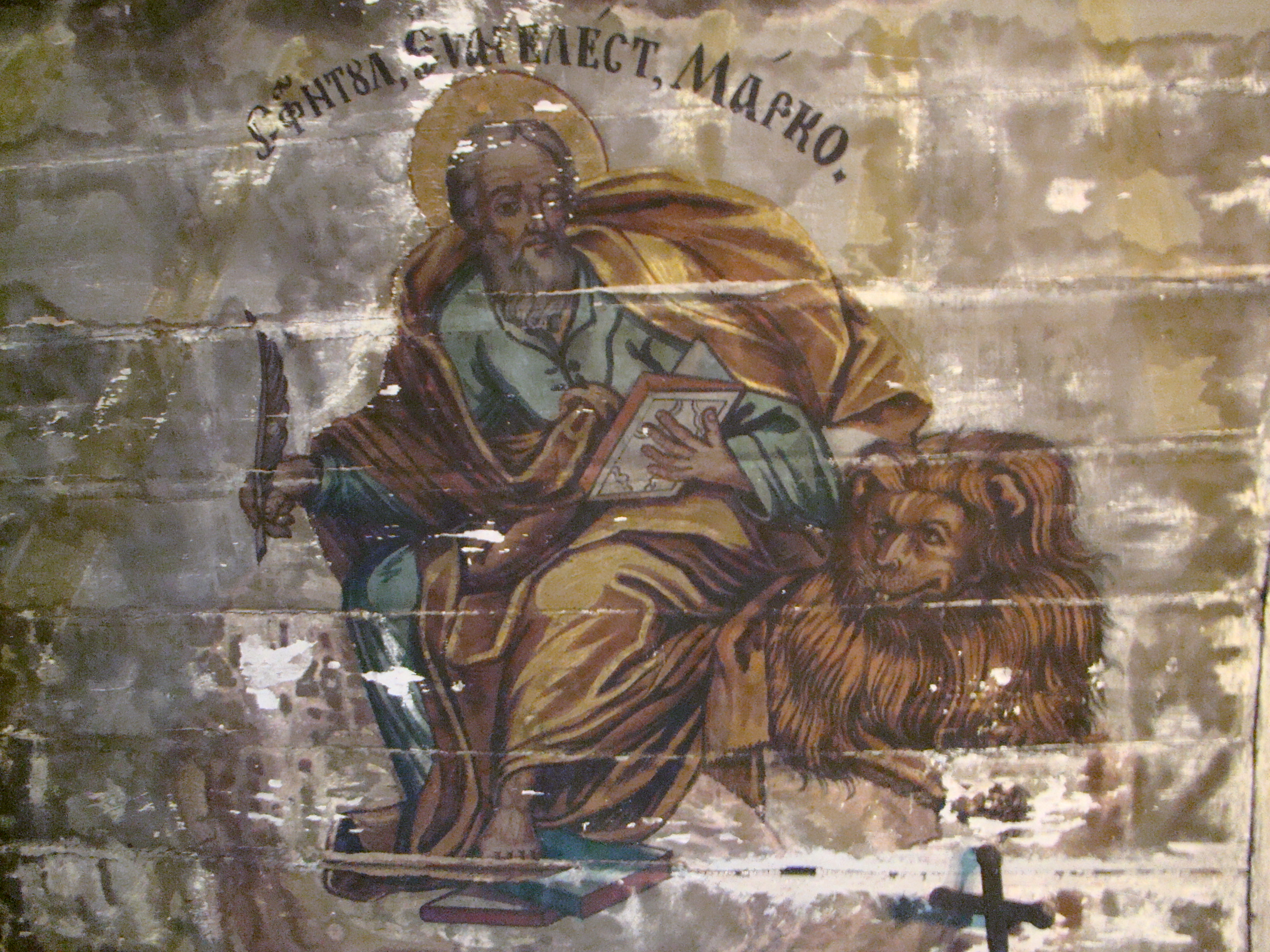 Biserica de lemn „Sf.Nicolae” din Căraci-Hunedoara